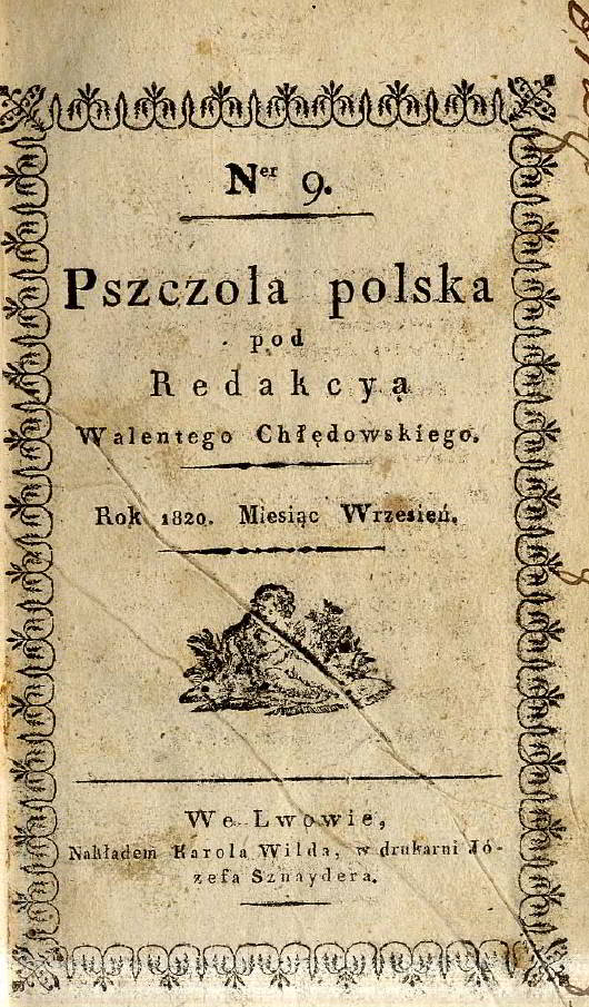 Pszczoła Polska Nr 9, wrzesień 1820